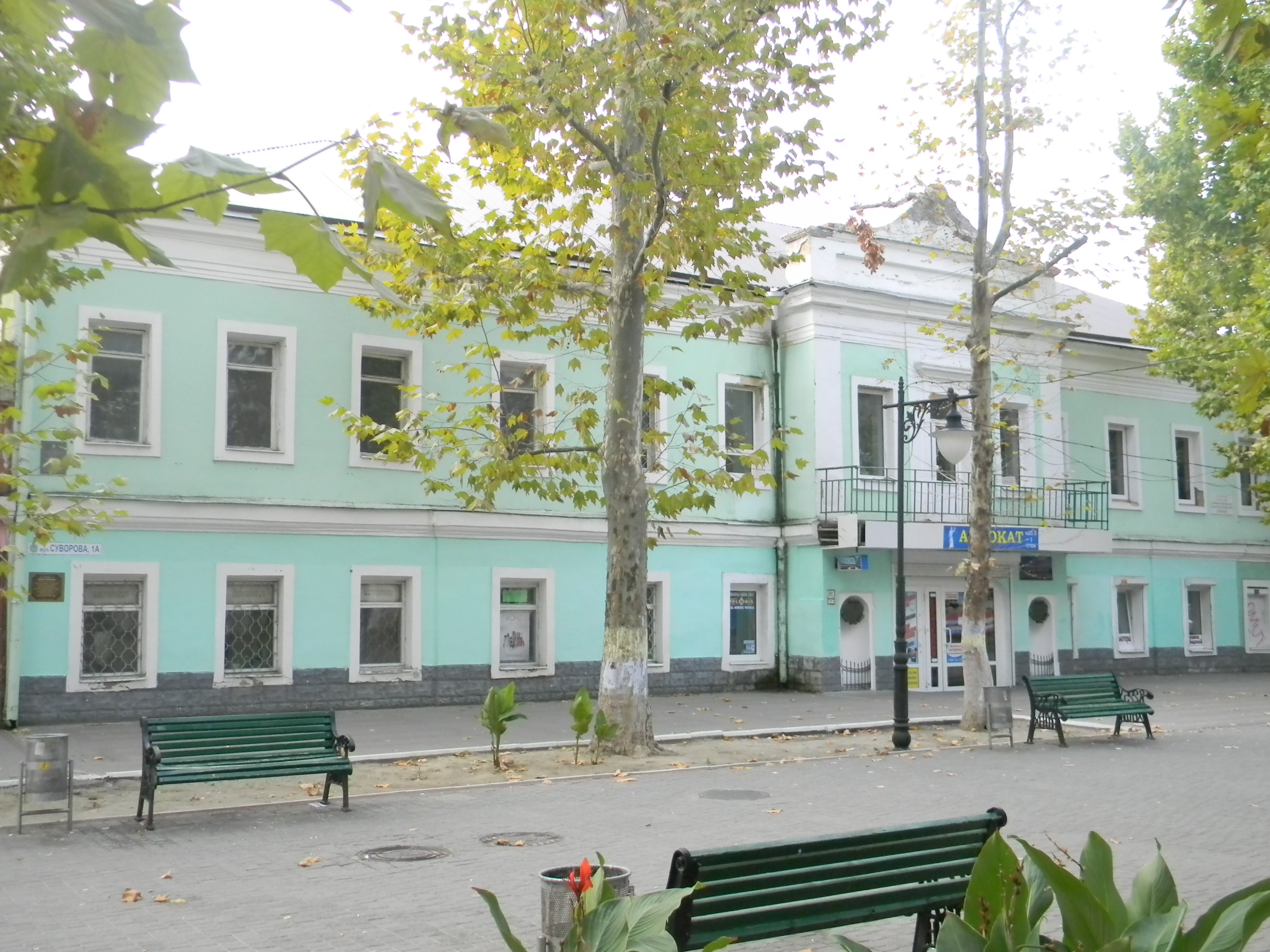 Будинок, в якому знаходилась штаб-квартира О. В. Суворова, Херсон, вул. Суворова, 1а (3)